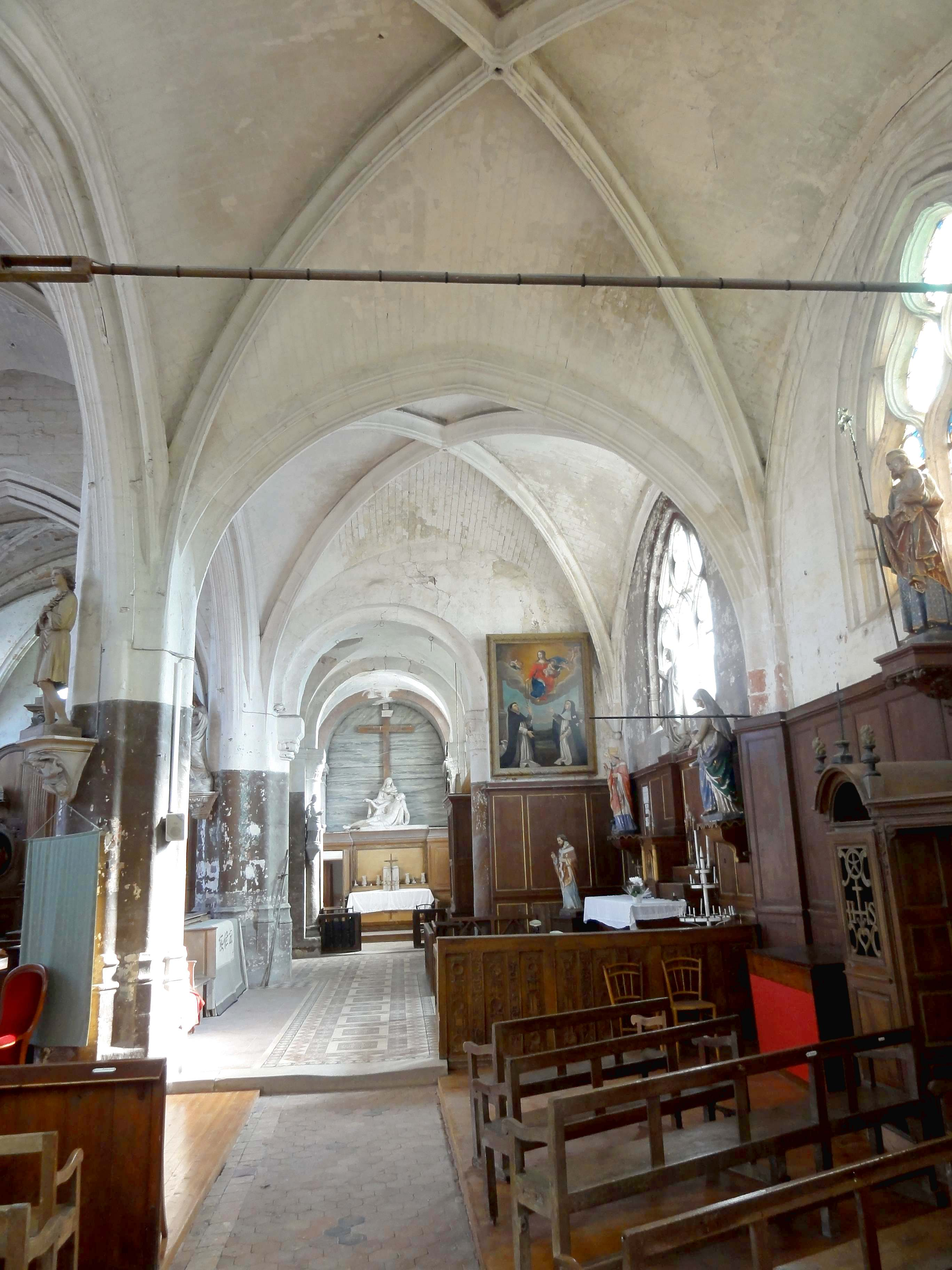 Intérieur de l'église - voir titre.